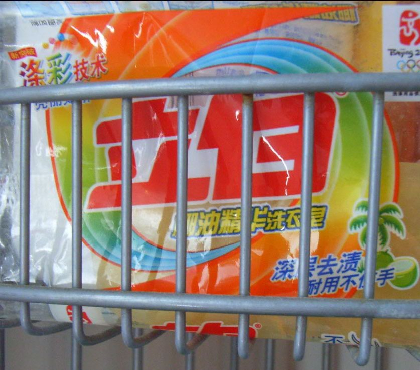 廣州立白企業集團 - 洗衫肥皂